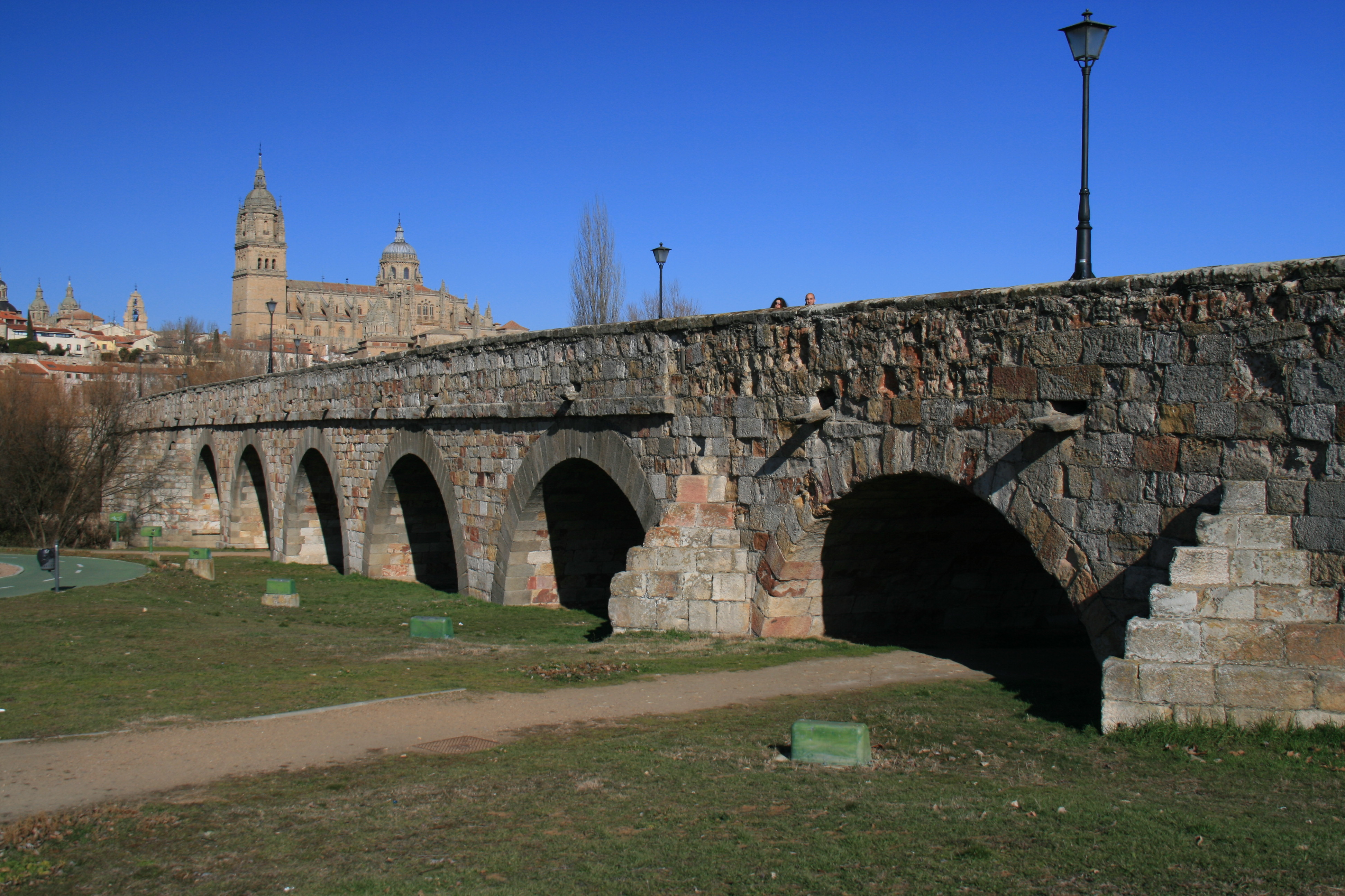 Arcos (aguas arriba) del "lado nuevo"